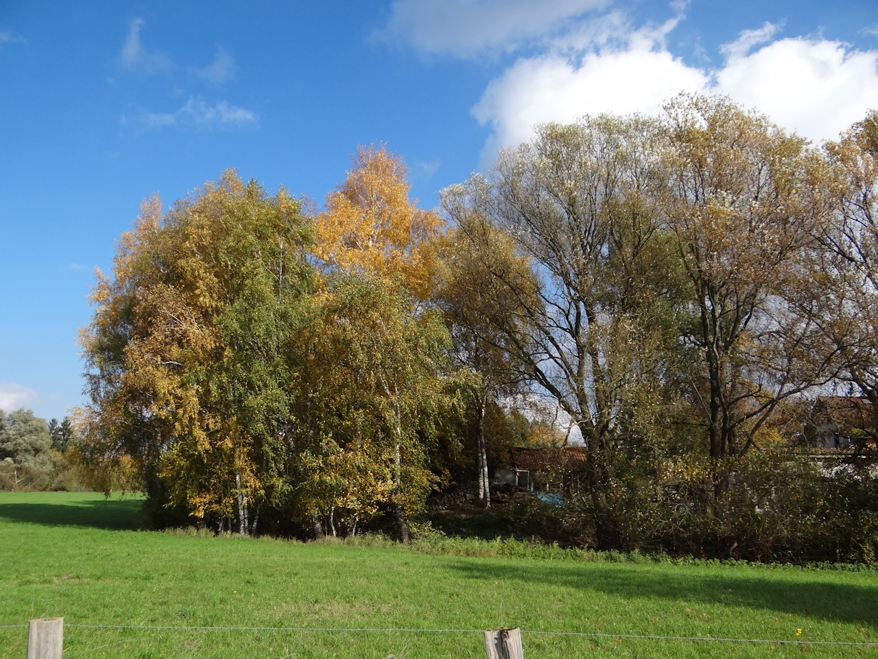 Zustand des Geländes der ehemaligen Mundburg bei Müden (Aller)-Dieckhorst im Oktober 2013,westlich der Landesstraße 283.